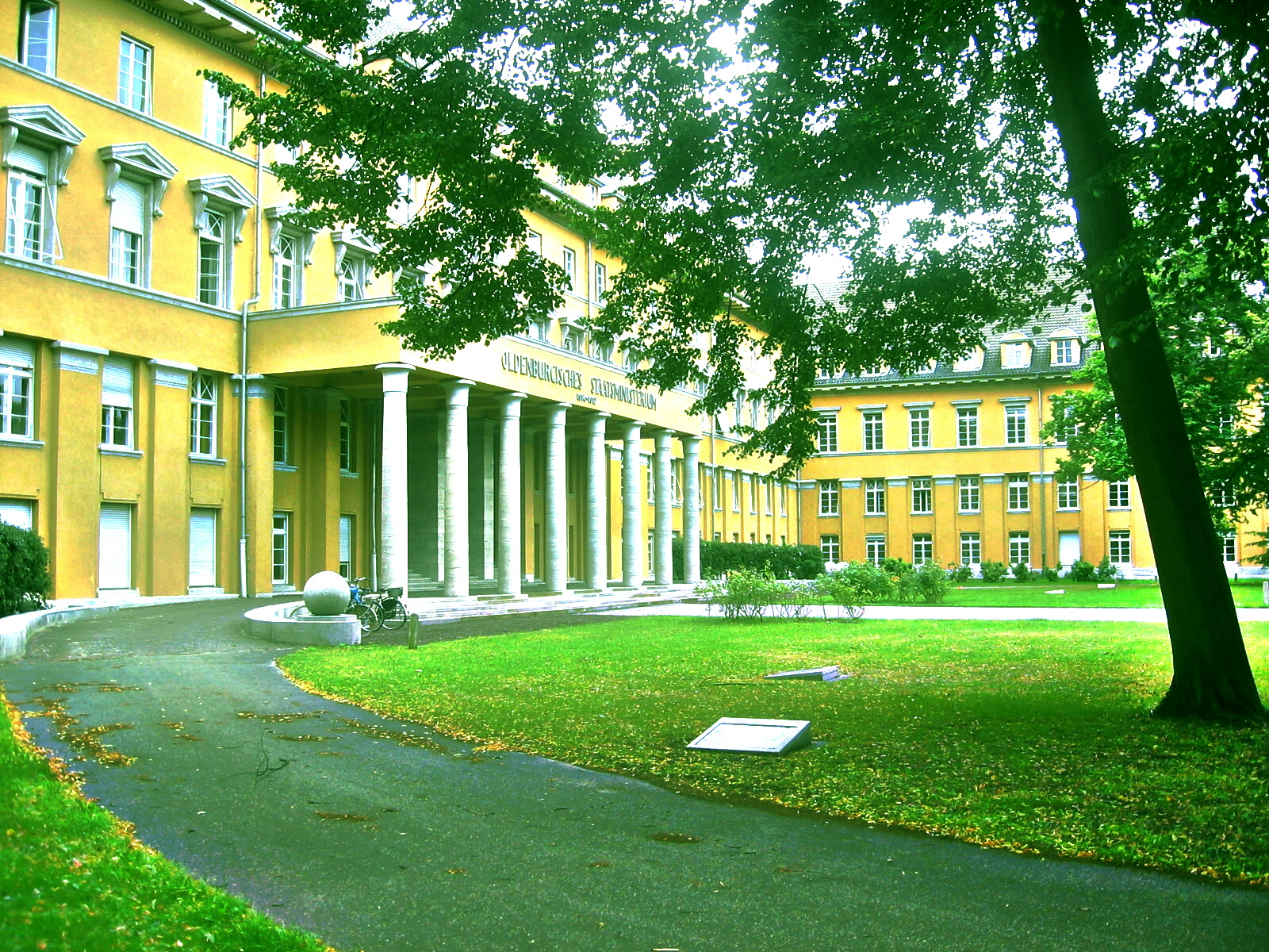 Dat ehrmalige Ollnborger Ministerium